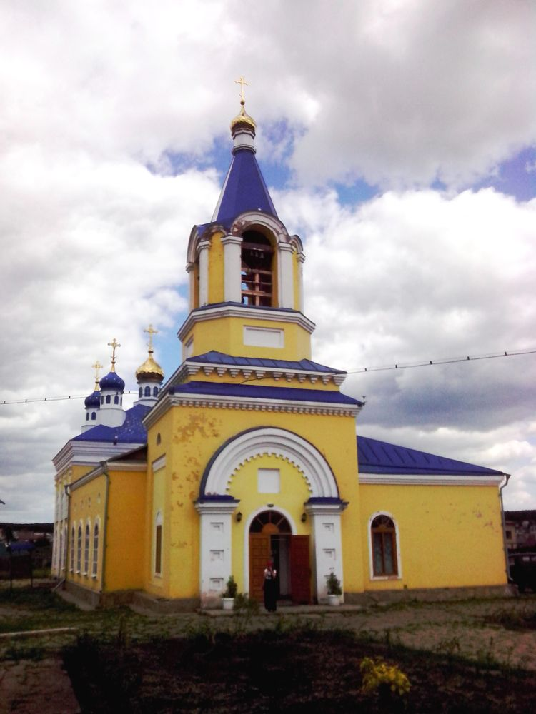 Вход в храм в селе Большебрусянское